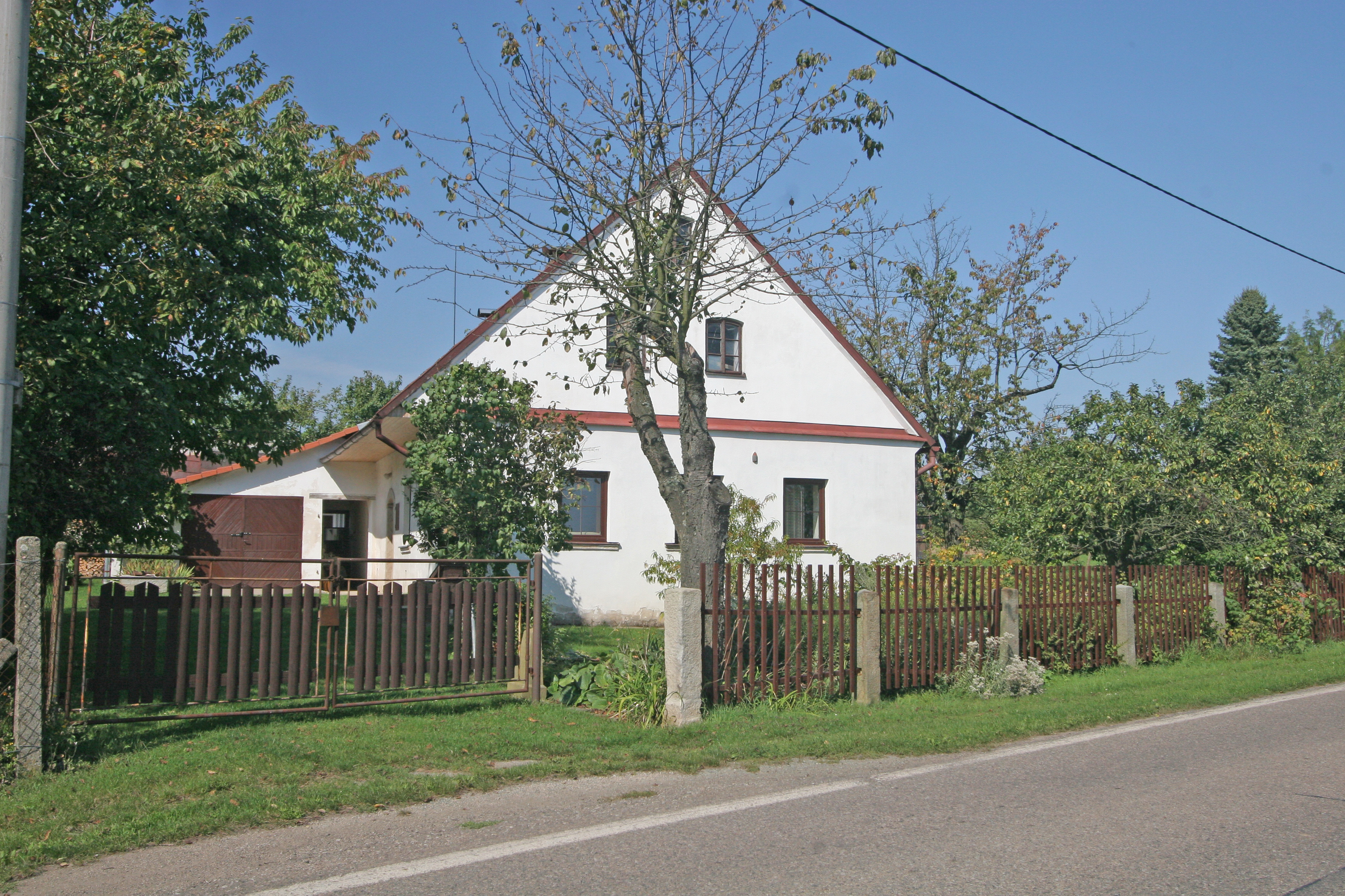 Sebuč čp. 8